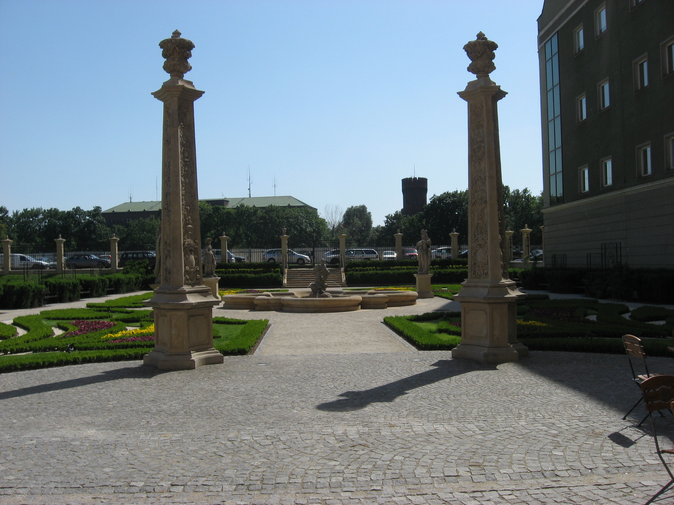 Ogród Barokowy przy Muzeum Miejskim Wrocławia